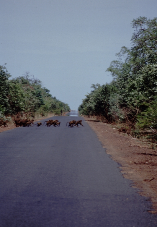 Auf der Süduferstraße in der Nähe von Bansang, Pavian-Herden (Guinea-Pavian (Papio papio)) sind auf diesem Straßenabschnitt die ständigen Begleiter